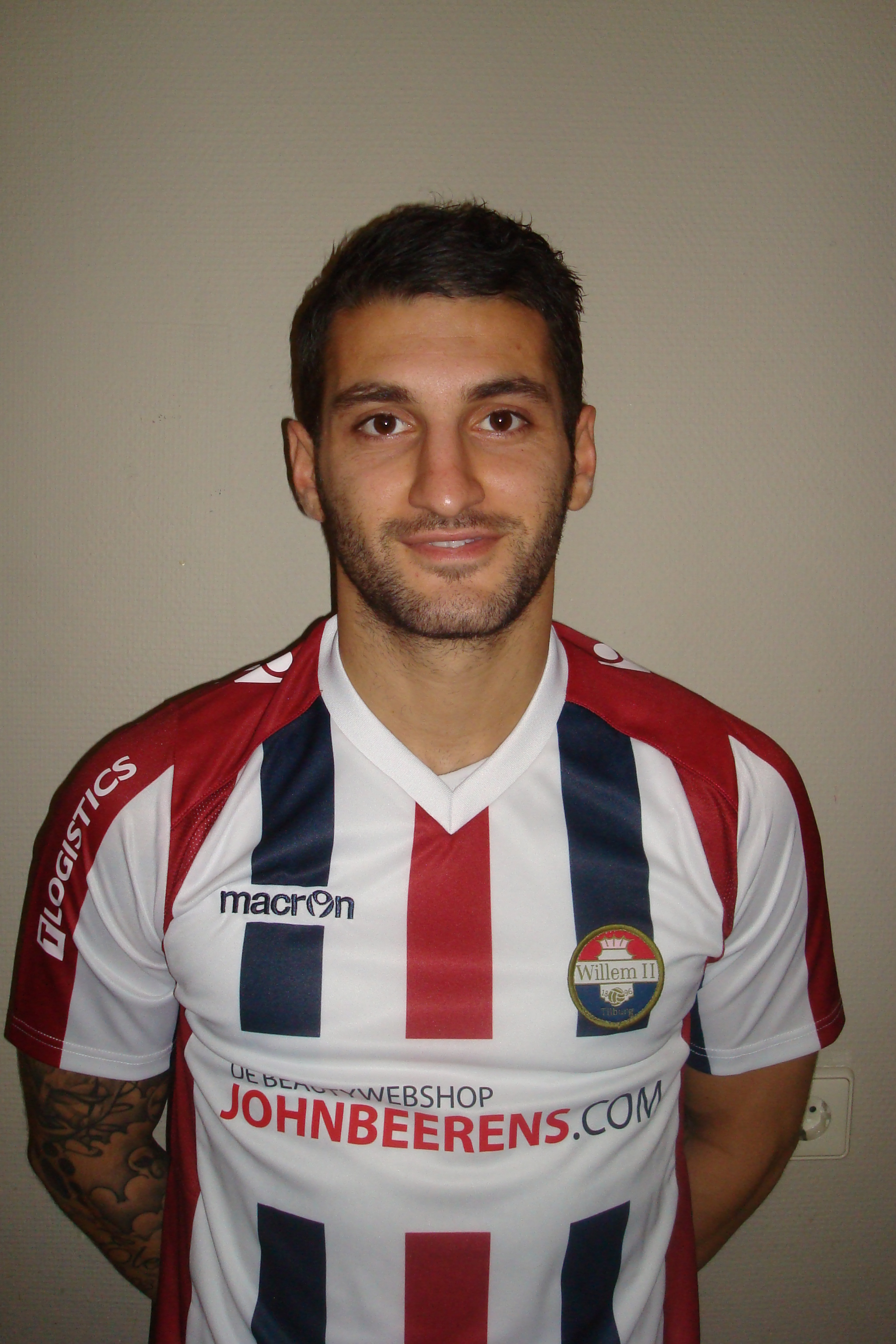 Norair Mamedov in het shirt van Willem II seizoen 2013/2014